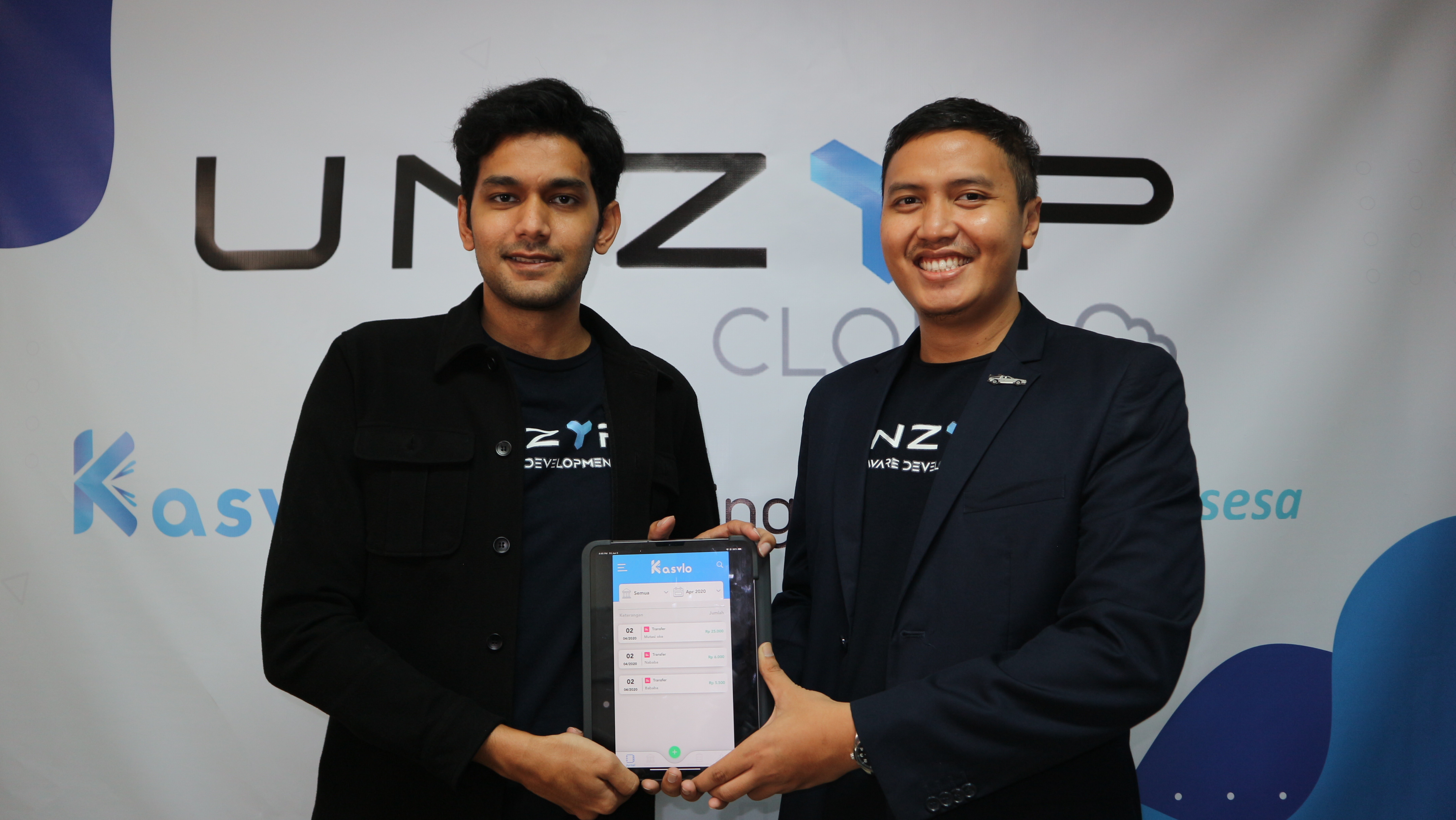 CEO Unzyp Software, Untag Pranata (kanan) dan salah seorang pendiri Unzyp Software, Fauzi Assegaf, memperkenalkan aplikasi Kasvlo bagian dari Unzyp Cloud.